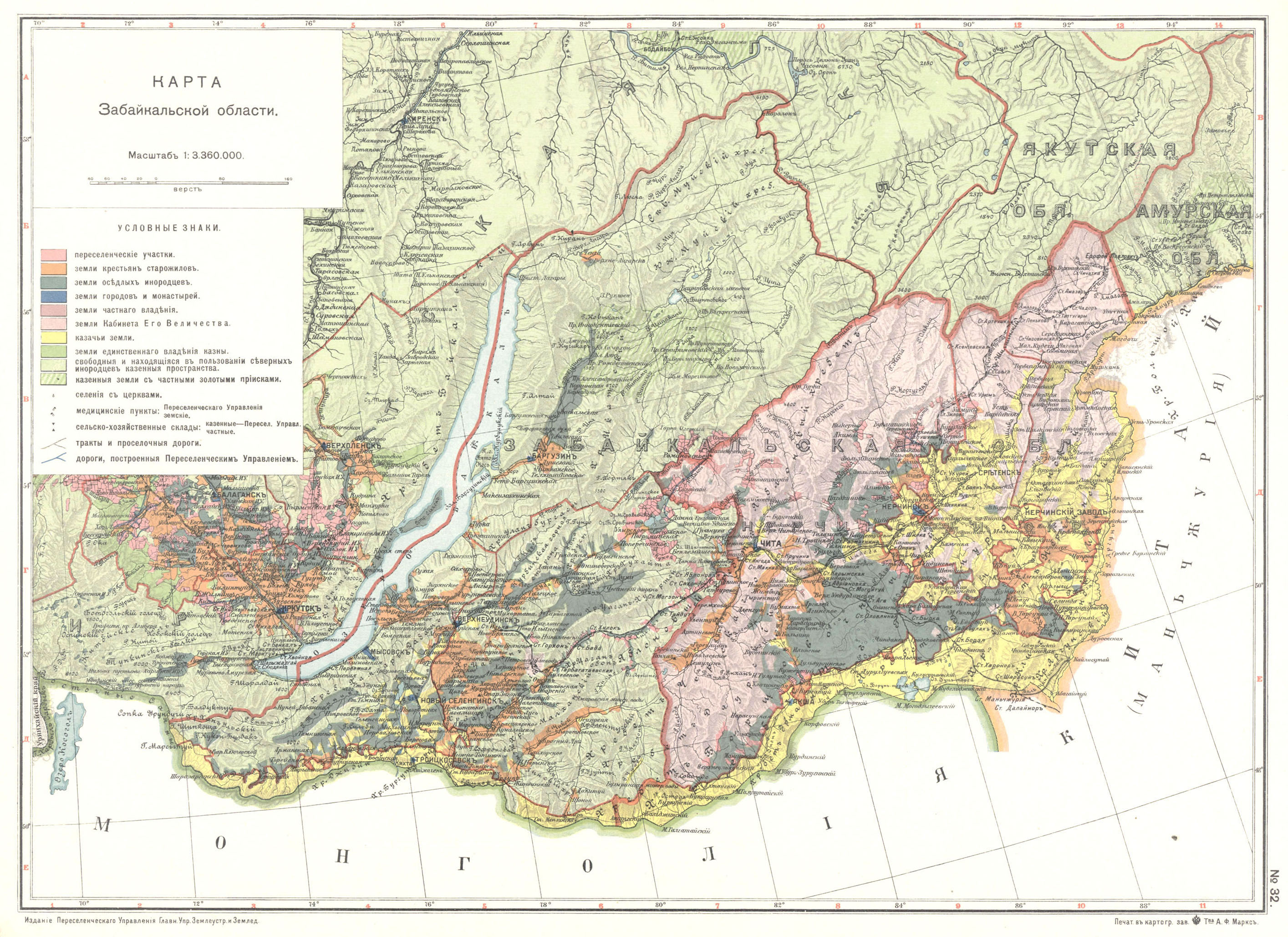 Карта земель ЗКВ. Указать год (Российская империя)